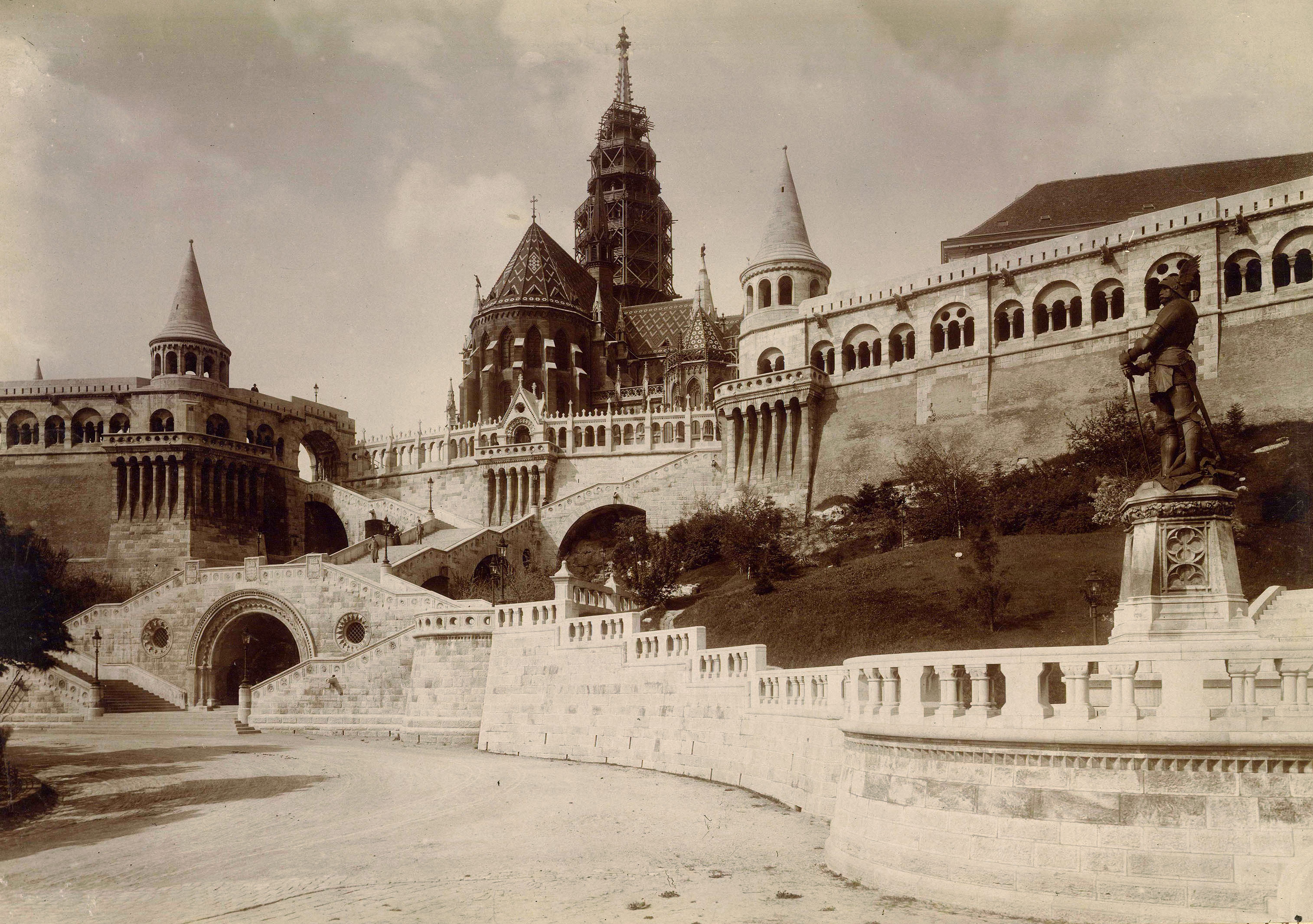 Halászbástya és a Schulek lépcső a Hunyadi János (Albrecht) útról nézve. Jobbra Hunyadi János szobra, háttérben a Mátyás-templom.